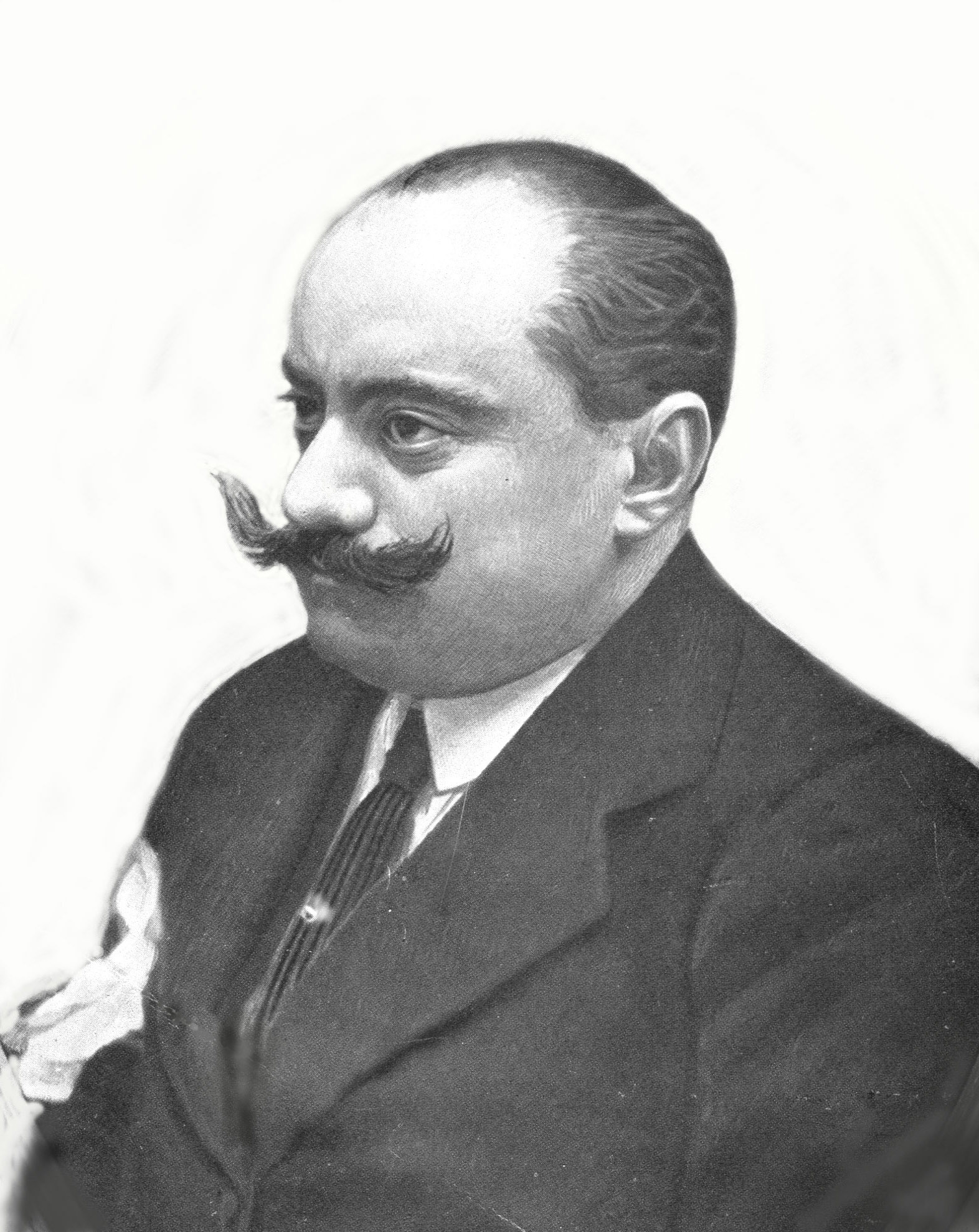 Il regista italiano Mario Caserini - foto del 1914